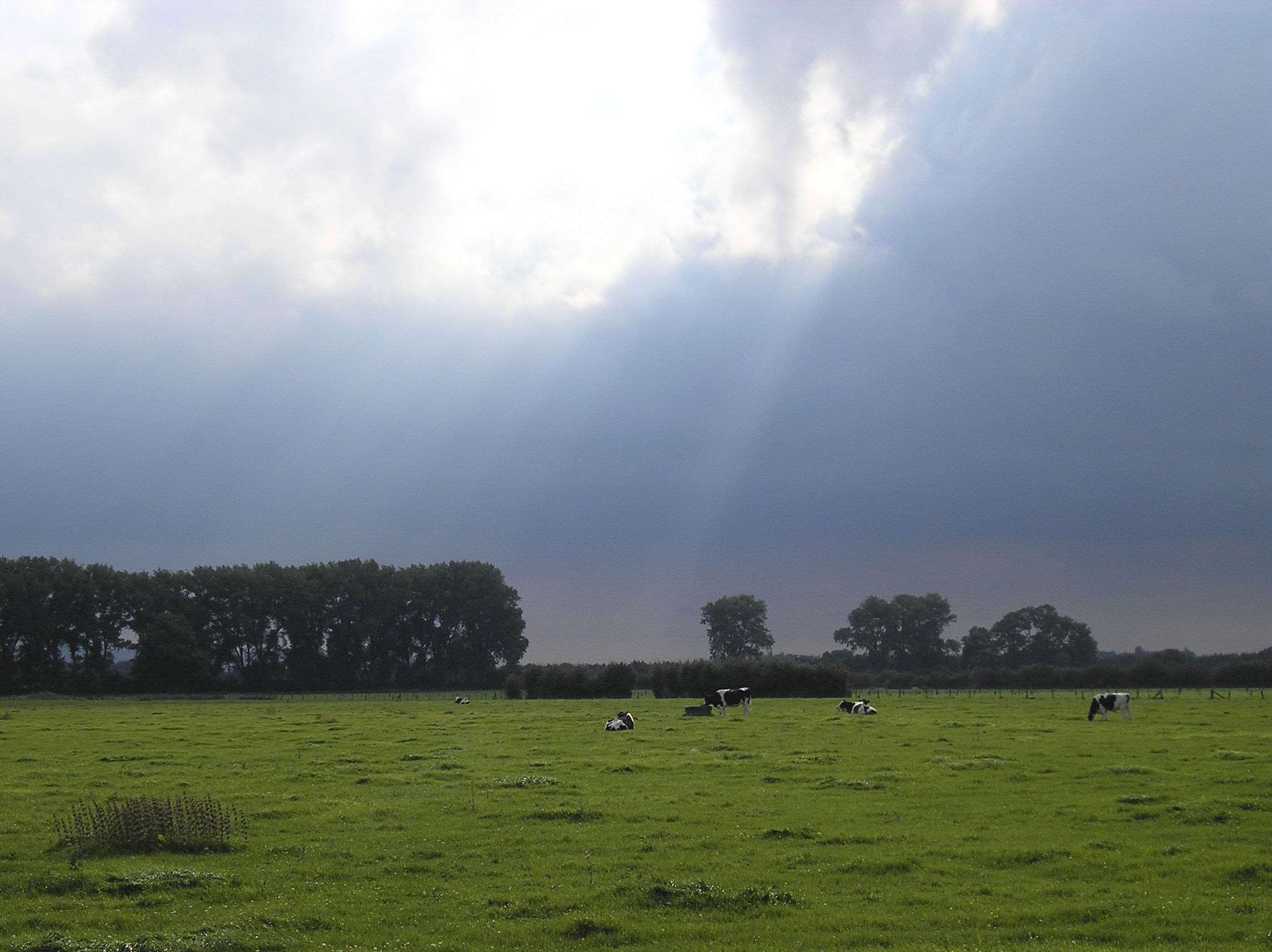 Blick von Mehr, Gemeinde Kranenburg in Richtung Süden: Wolken über der Düffelniederung